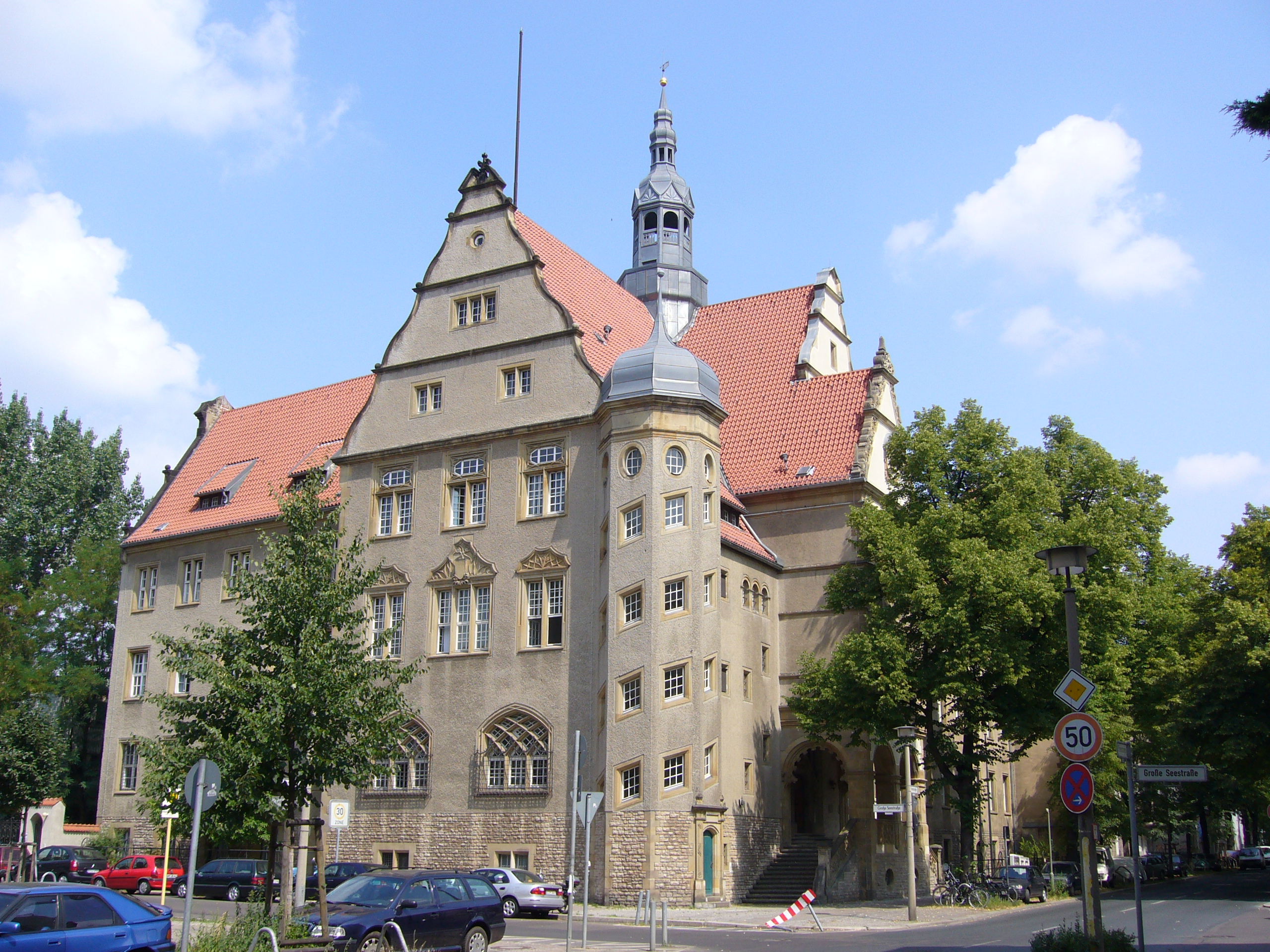 Das Dienstgebäude Parkstraße des Amtsgerichts Pankow/Weißensee